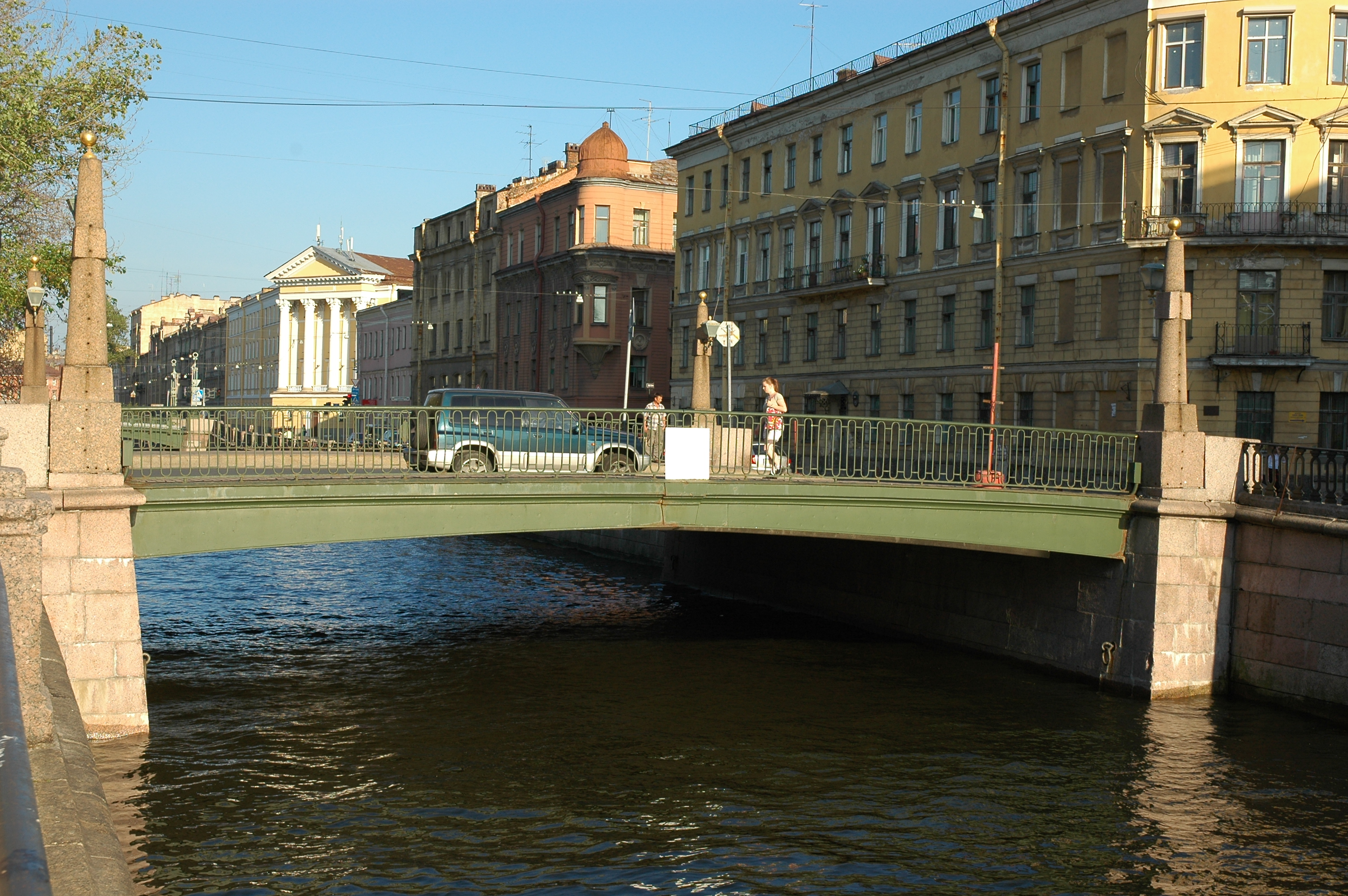 Podiacheskii bridge, Griboedova canal (St Petersburg)